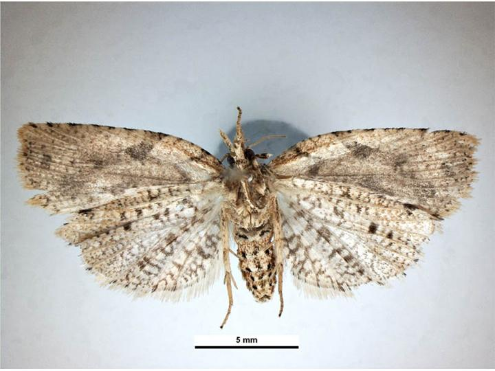 Ctenopseustis obliquana female, ventral view